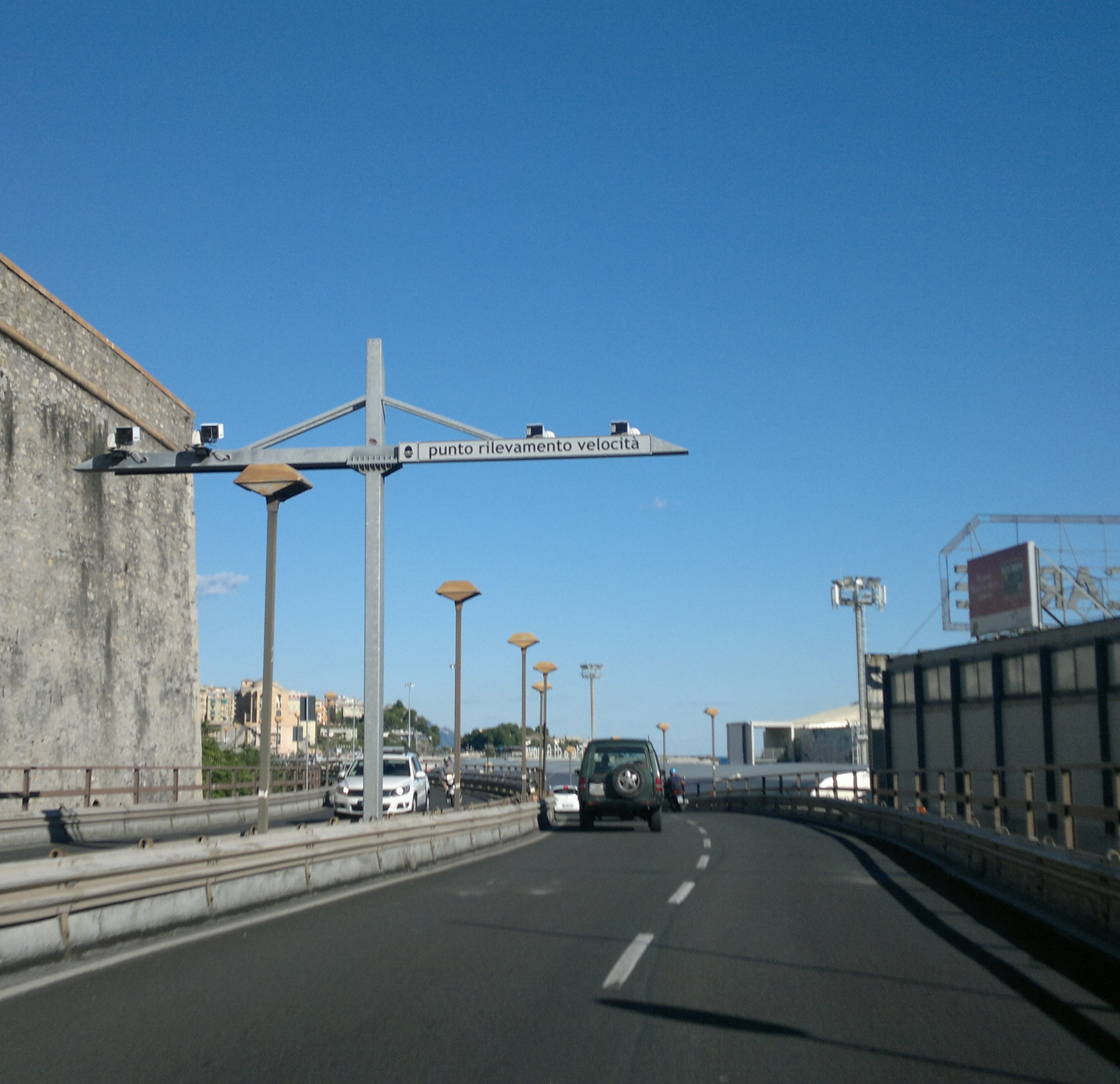 Punto di rilevamento velocità/strada Aldo Moro